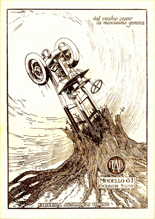 Pubblicità dell'automobile Itala Modello 61 a 6 cilindri 2 litri, in "Le vie d'Italia", 1925, 1, rivista mensile del Touring Club Italiano, organo ufficiale dell'Ente nazionale per le industrie turistiche (AS Ragusa, SAS Modica, Biblioteca De Leva, Riviste, n.7)